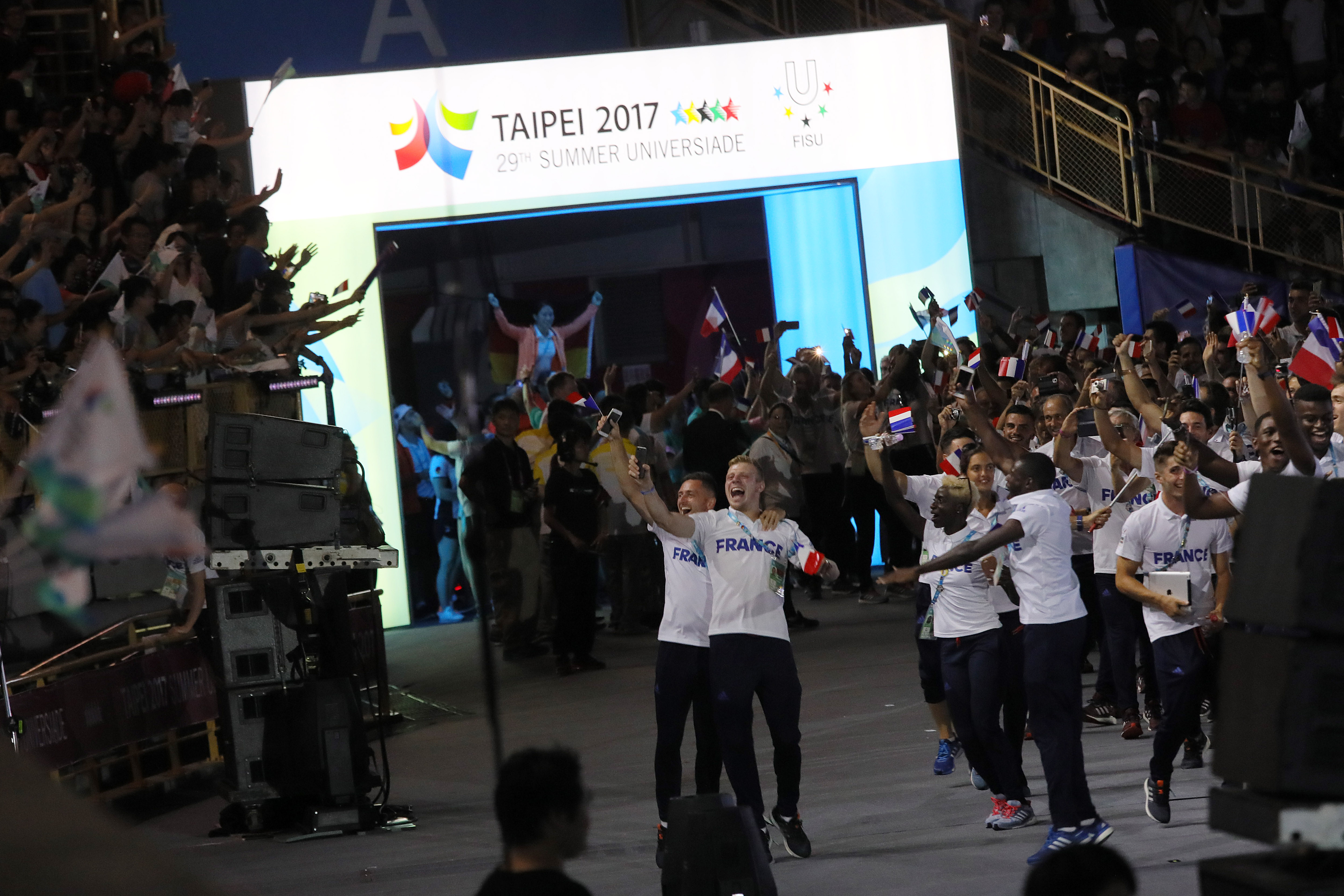 08.19 2017年世界大學運動會開幕典禮，各國選手代表與會旗進場